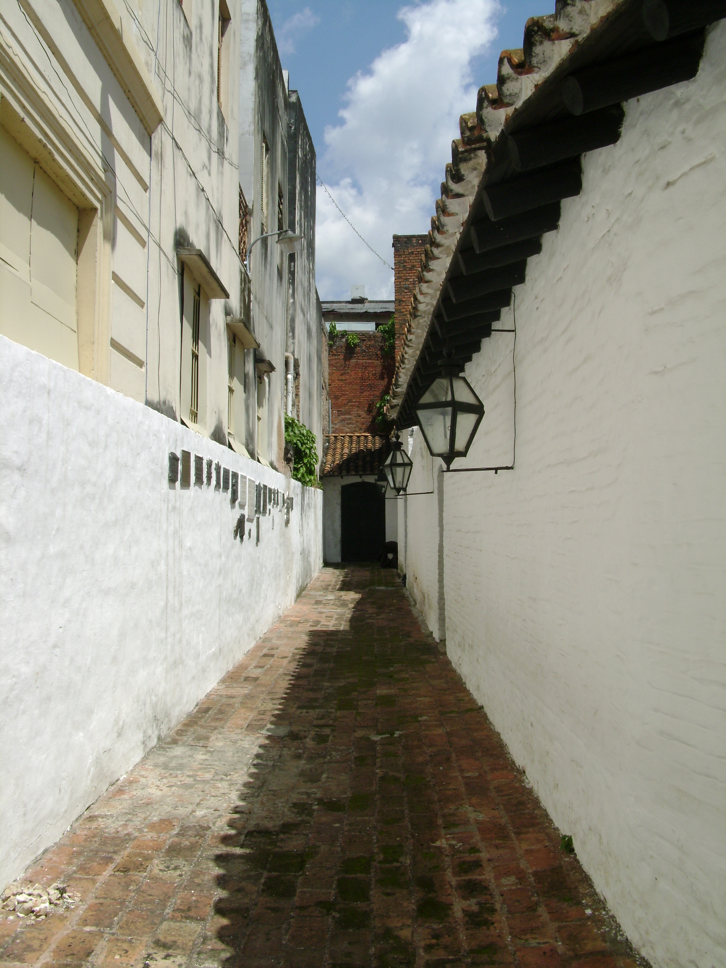 Callejon